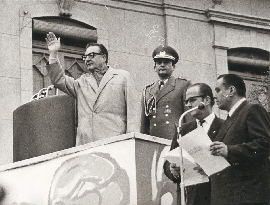 11/07/1971. En la plaza de Rancagua en el marco de las Actividades por la Nacionalización del Cobre.